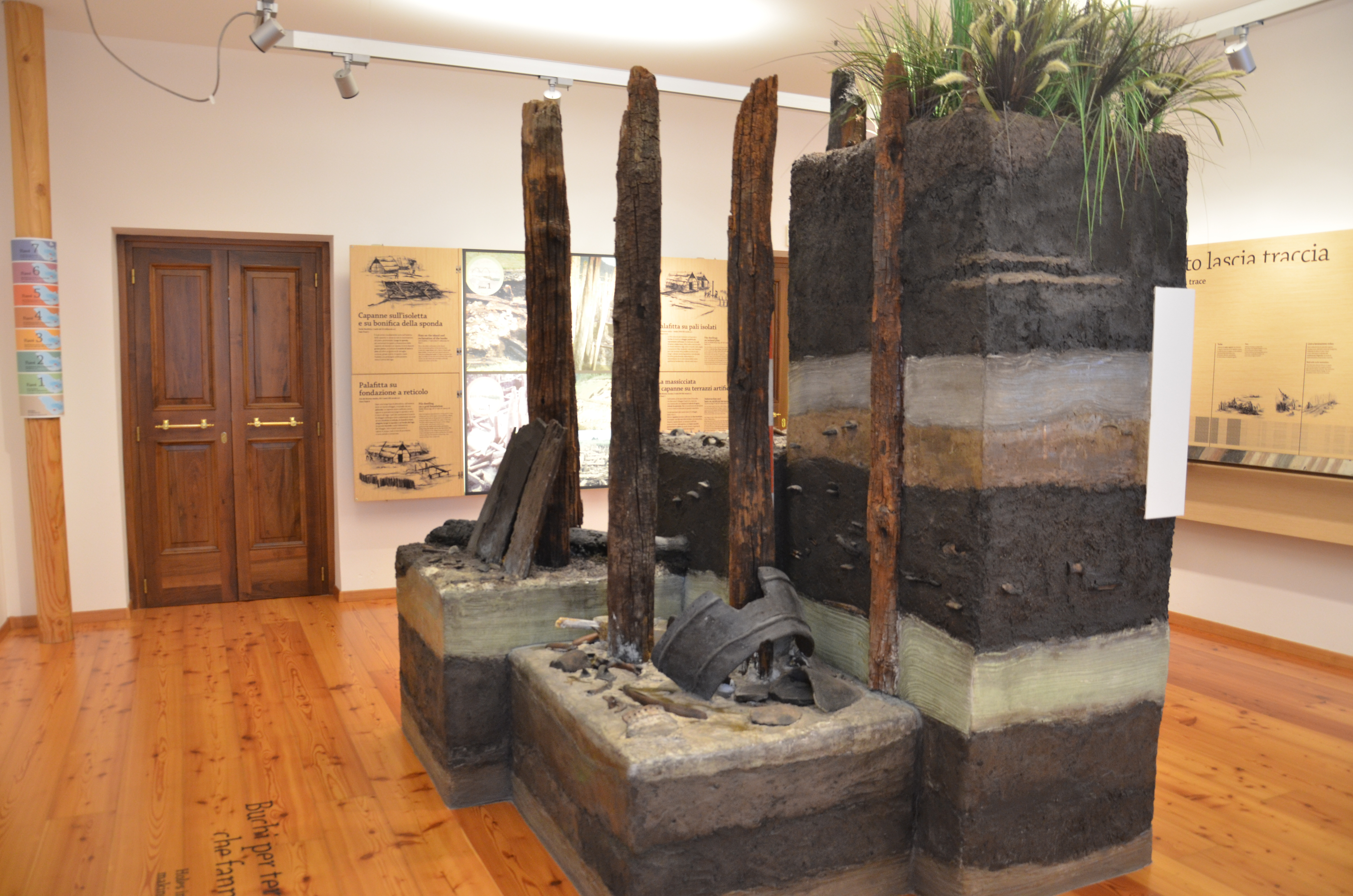 Museo delle palafitte di Fiavè This is a photo of a monument which is part of cultural heritage of Italy.